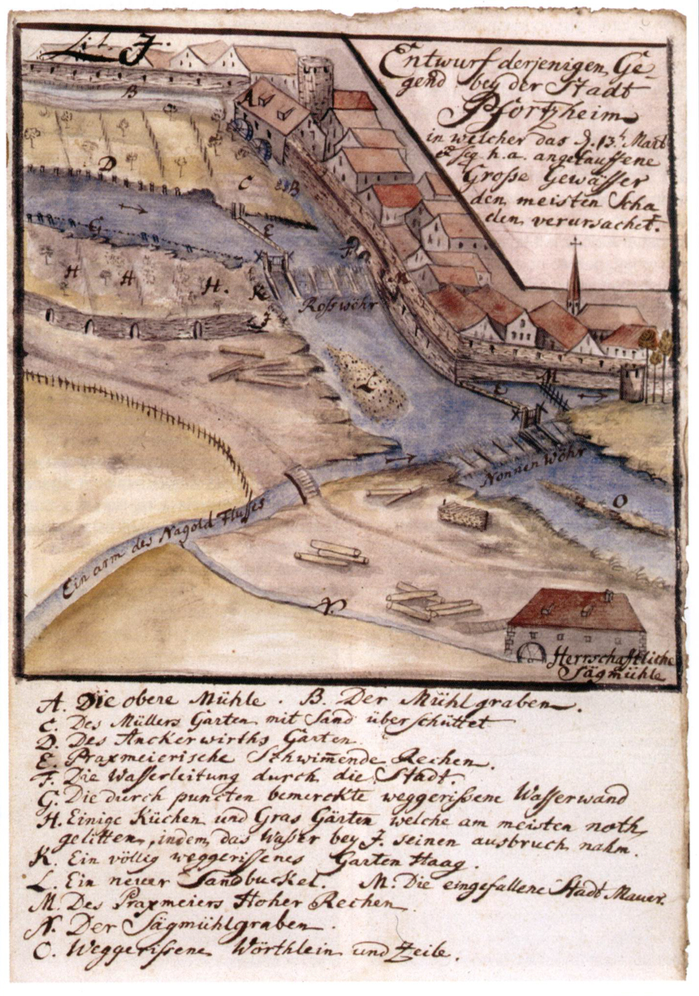 Hochwasserschäden in Pforzheim am Zusammenfluss von Enz und Nagold